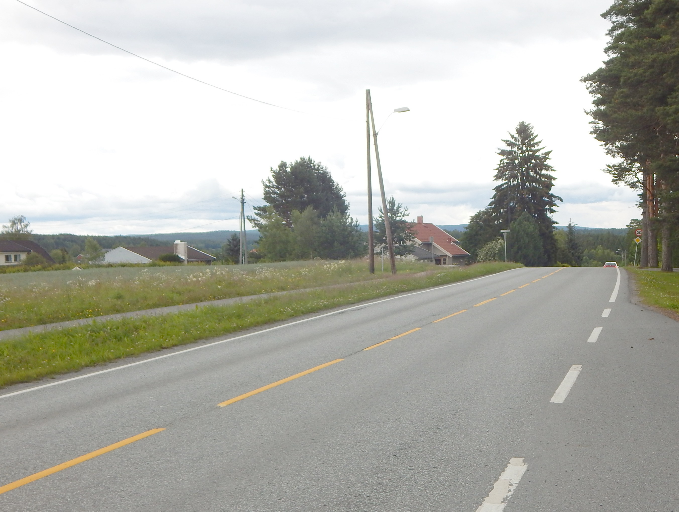 Aurveien (fylkesvei 236) forbi Aurskog kirke